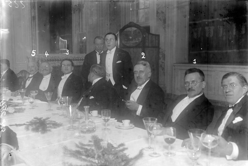 Aus Anlass der Abreise des Argentinischen Generalkonsuls in Berlin, Alberto M. Candioti, veranstalteten die deutsch-spanischen Vereinigungen ein Festessen, an welchem hervorragende Vertreter der Reichsregierung, Kunst- und Wissenschaft, teilnehmen. Die Ehrengäste an der Festtafel. 1. Reichstagspräsident Löbe, 2. Conrad v. Bang, 3. Generalkonsul Alberto M. Candiote, 4. Geheimrat Prof. Dr. Roethe, 5. Geheimrat Prof. Dr. Hernst.